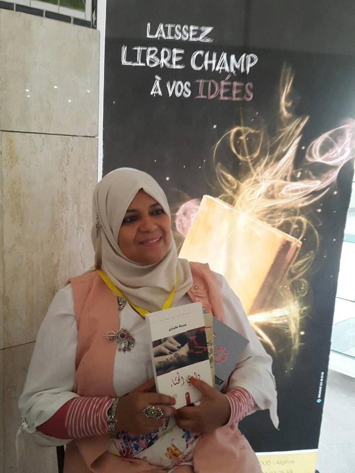 جميلة طلباوي، خلال مشاركتها في اللقاءات السنوية للأديبات الشابات ،البحر الابيض المتوسط وإفريقيا الجزائر 2018